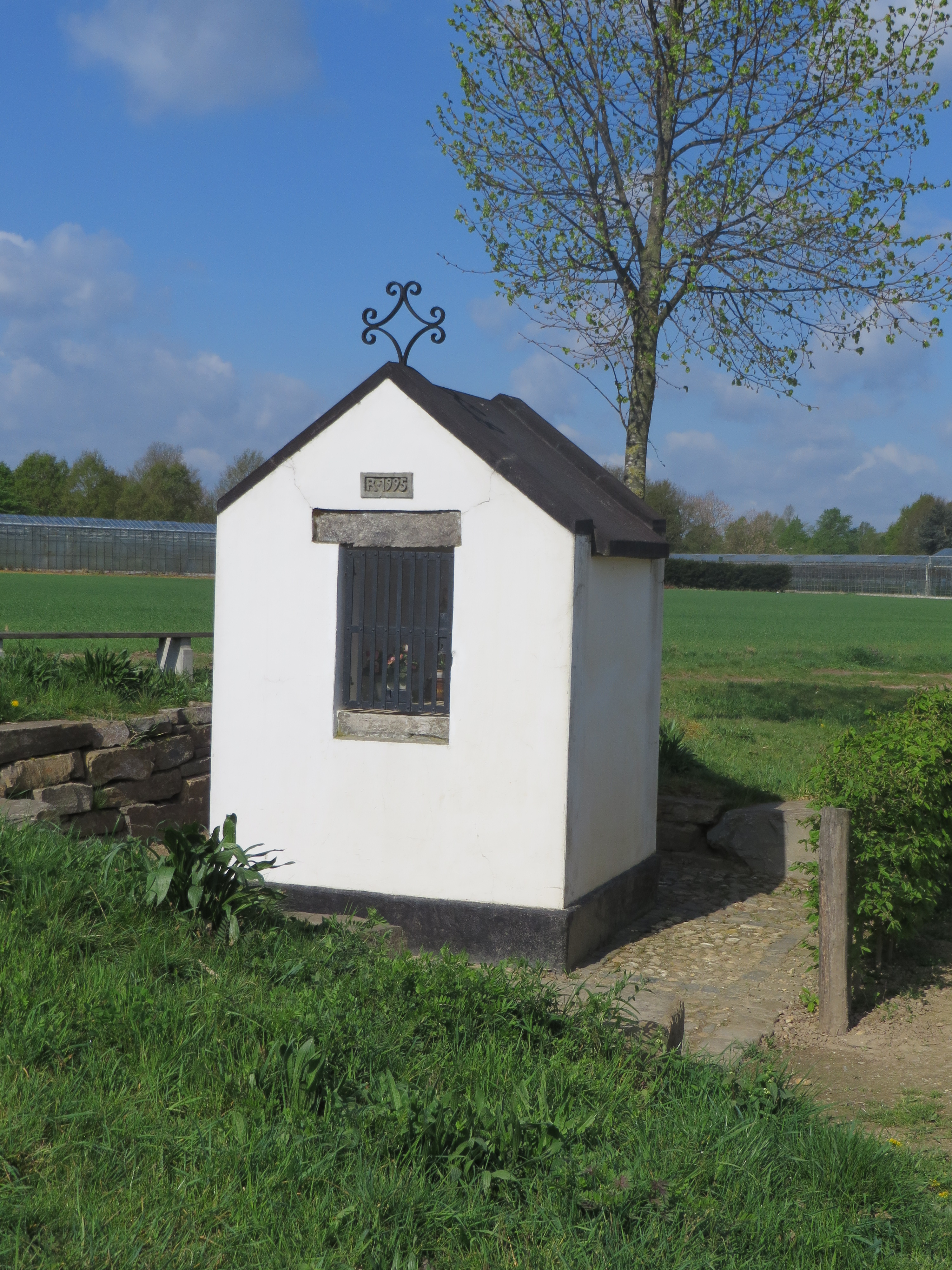 Veldkapelletje van de H. Barbara, Thorn (Limburg)